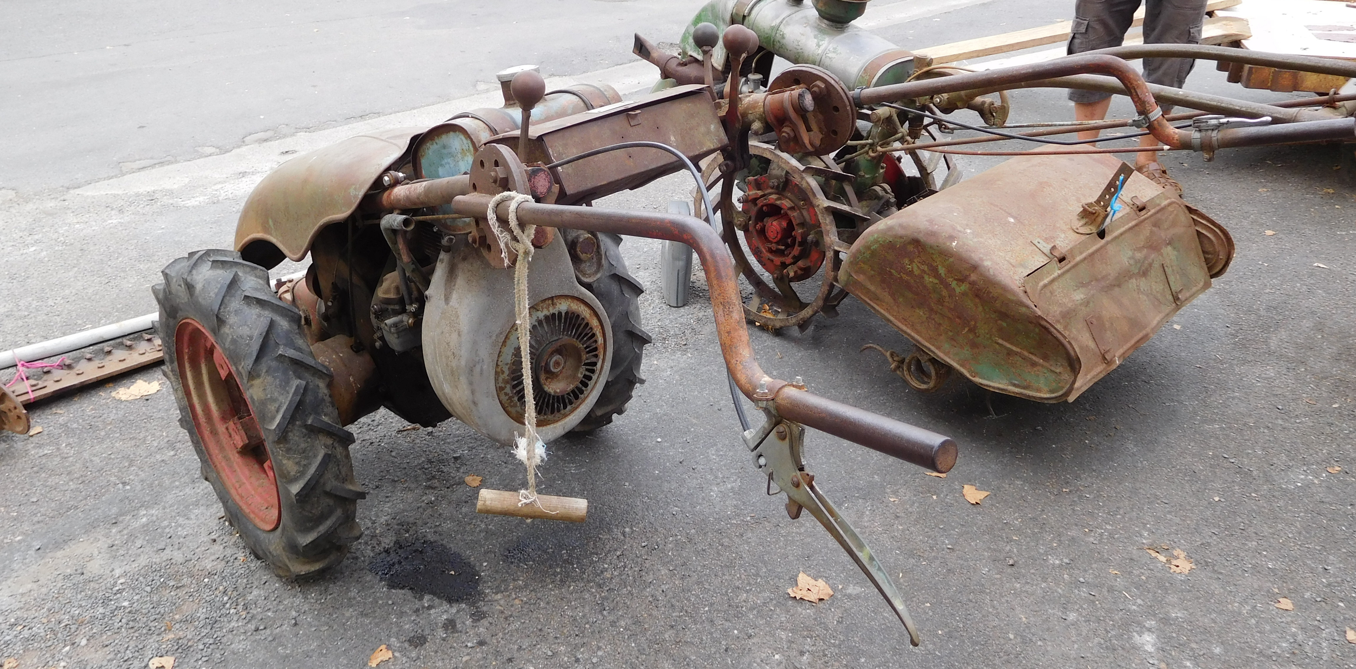 Motofaucheuse Motostandard (à gauche).